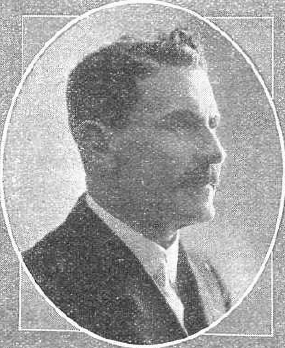 Fotografía del poeta español Salvador Rueda publicada en 1914 con motivo de la aparición de su libro Cantando por esos mundos